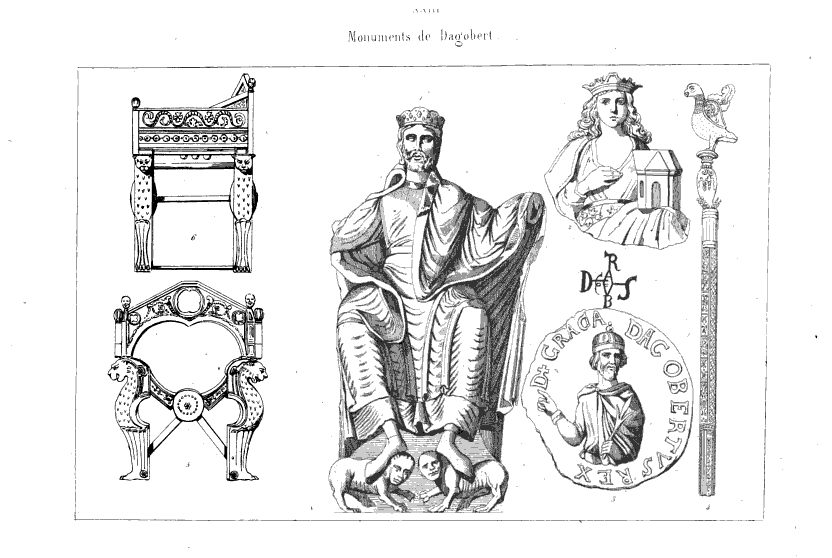 Gravure extraite de France historique et monumentale - Planche XXIII - Monuments de Dagobert